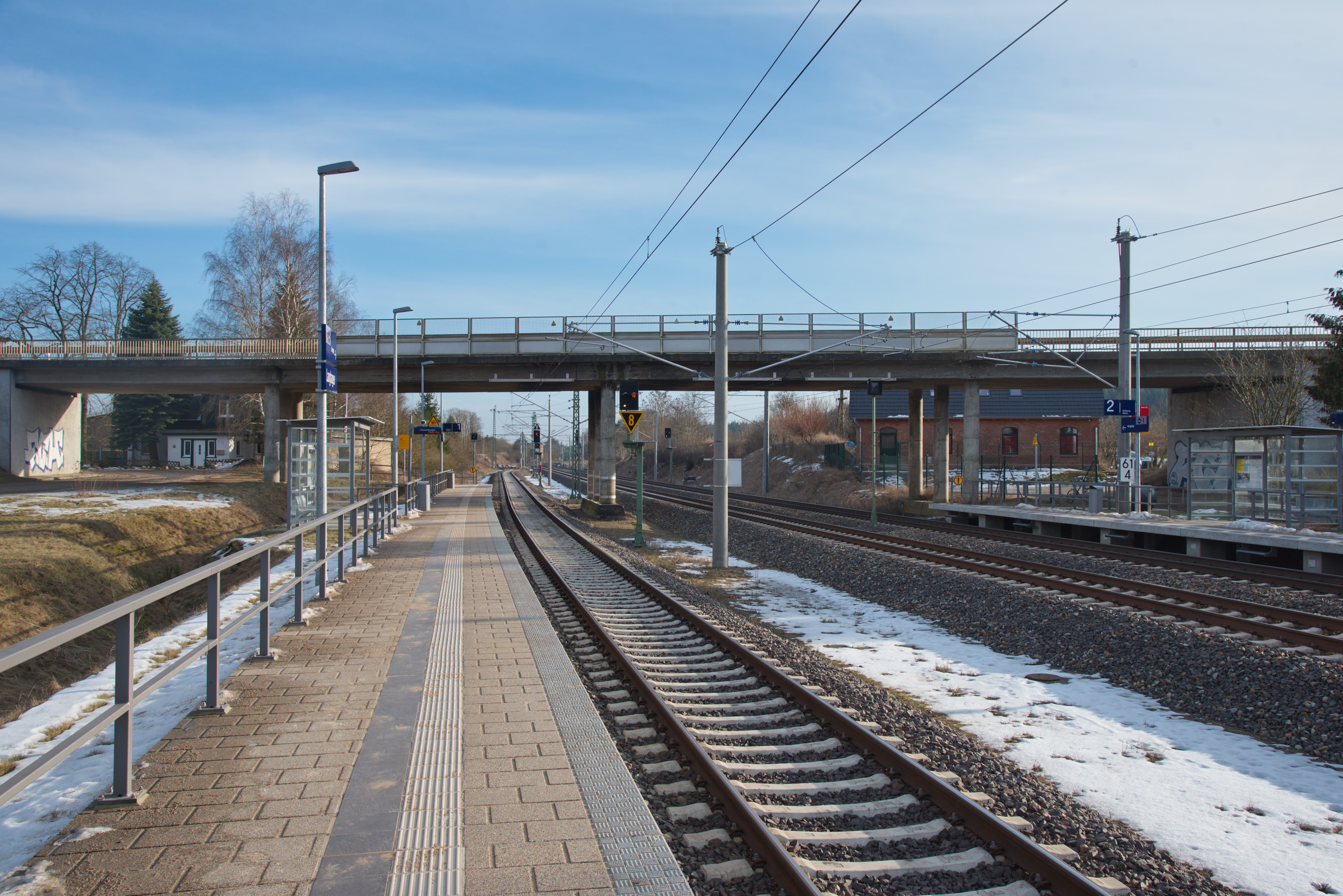 Die Bahnsteiganlagen vom Bahnhof Langhagen im Februar 2017.